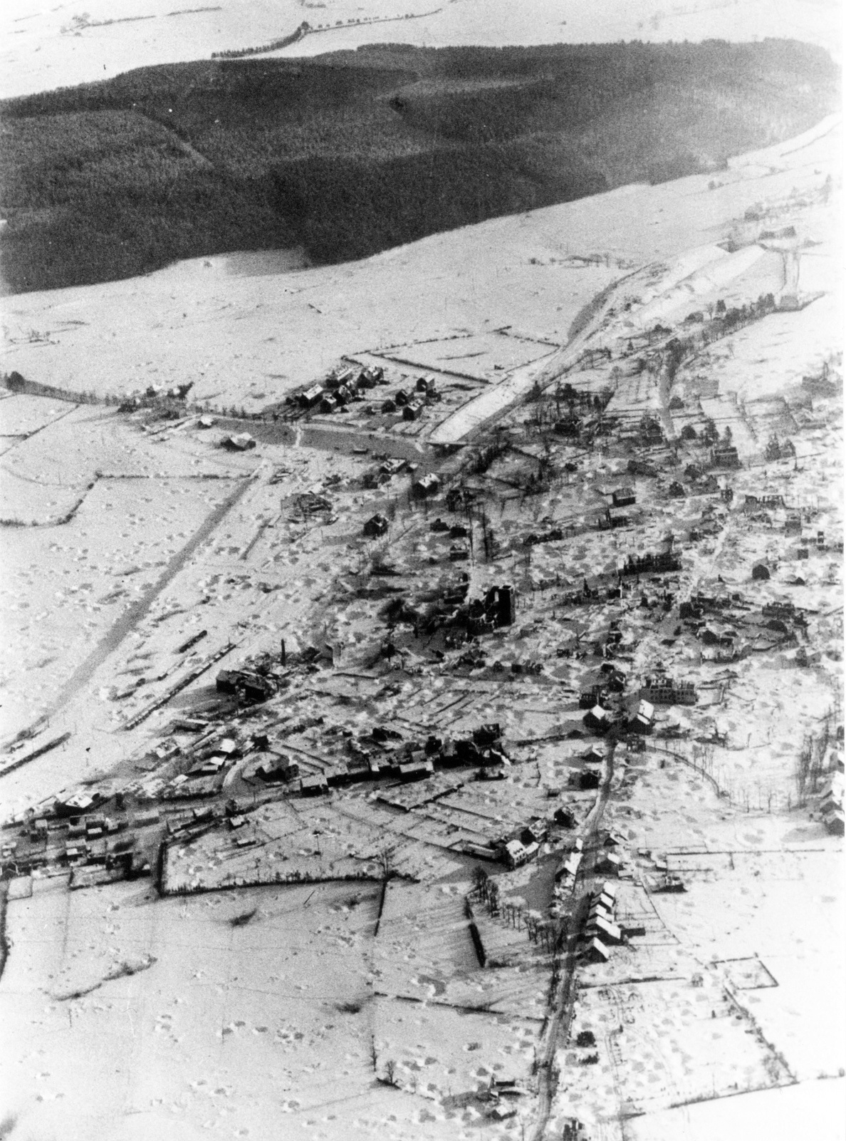 St. Vith, Belgium